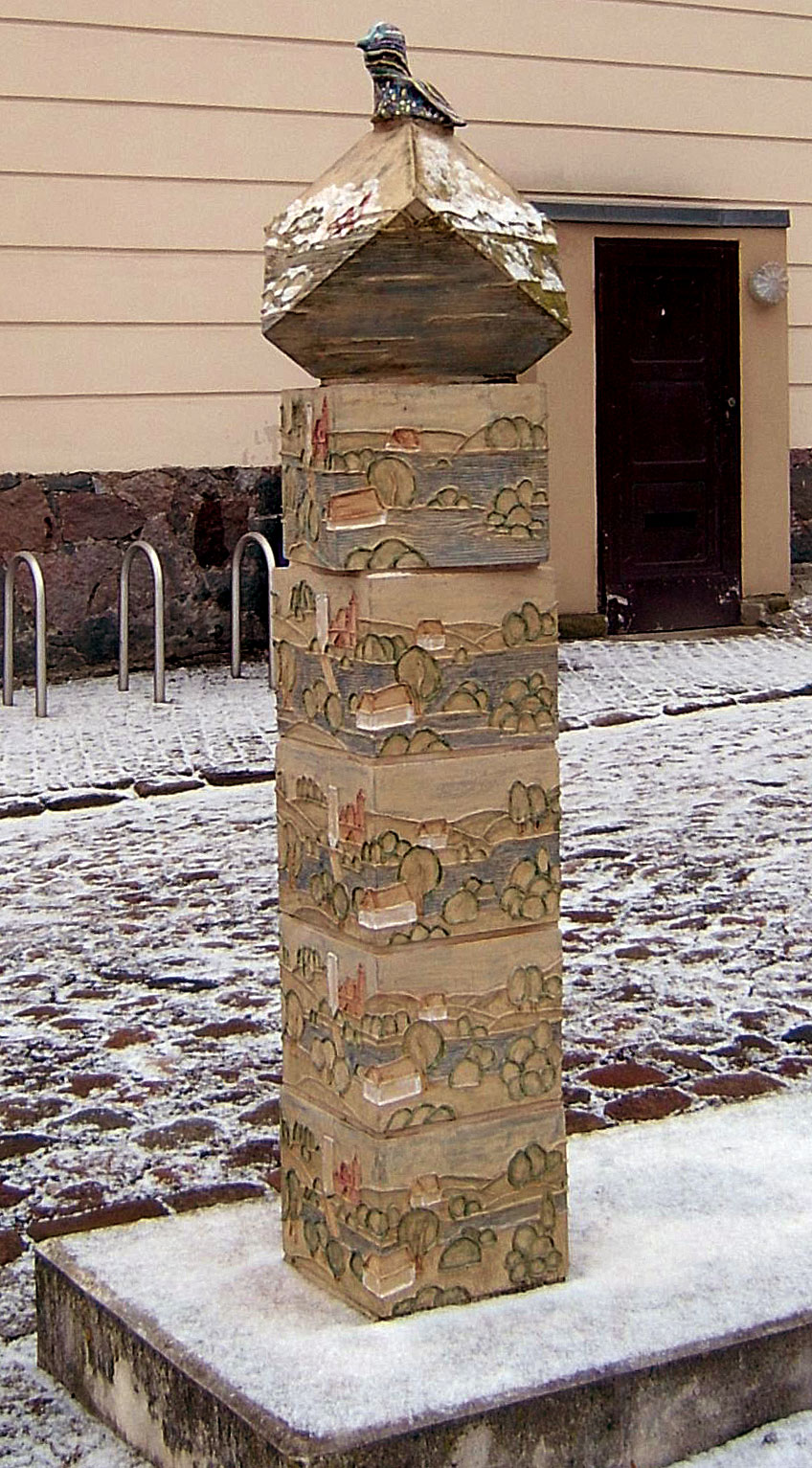 Der Flutstein ist ein Werk in Frankfurt (Oder), welches die Gronenfelder Werkstätten nach einer Idee der Leiterin Toni Gehlsen schufen. Er wurde nach dem Oderhochwasser 1997 errichtet. Gestiftet hat die 1,5 m hohe Stele der Lions Club. Sie besteht aus sechs Quadern. Die untersten vier stehen exakt übereinander, der fünfte ist leicht verdreht und der sechste steht auf einer seiner Kanten. Auf der gegenüberliegenden, obersten Kante sitzt ein Richtung Oder blickender Vogel. Auf den Steinen ist Frankfurt und die Oder abgebildet. Dabei ist die Oder auf dem untersten Stein flach dargestellt, und sie wird, je höher der Stein, immer größer und wilder dargestellt. Eingeweiht wurde das Werk im September 1998 von Generalleutnant Hans-Peter von Kirchbach. Zu finden ist der Flutstein an der Oderpromenade unweit des Kartoffelhauses auf dem Holzmarkt. [1].